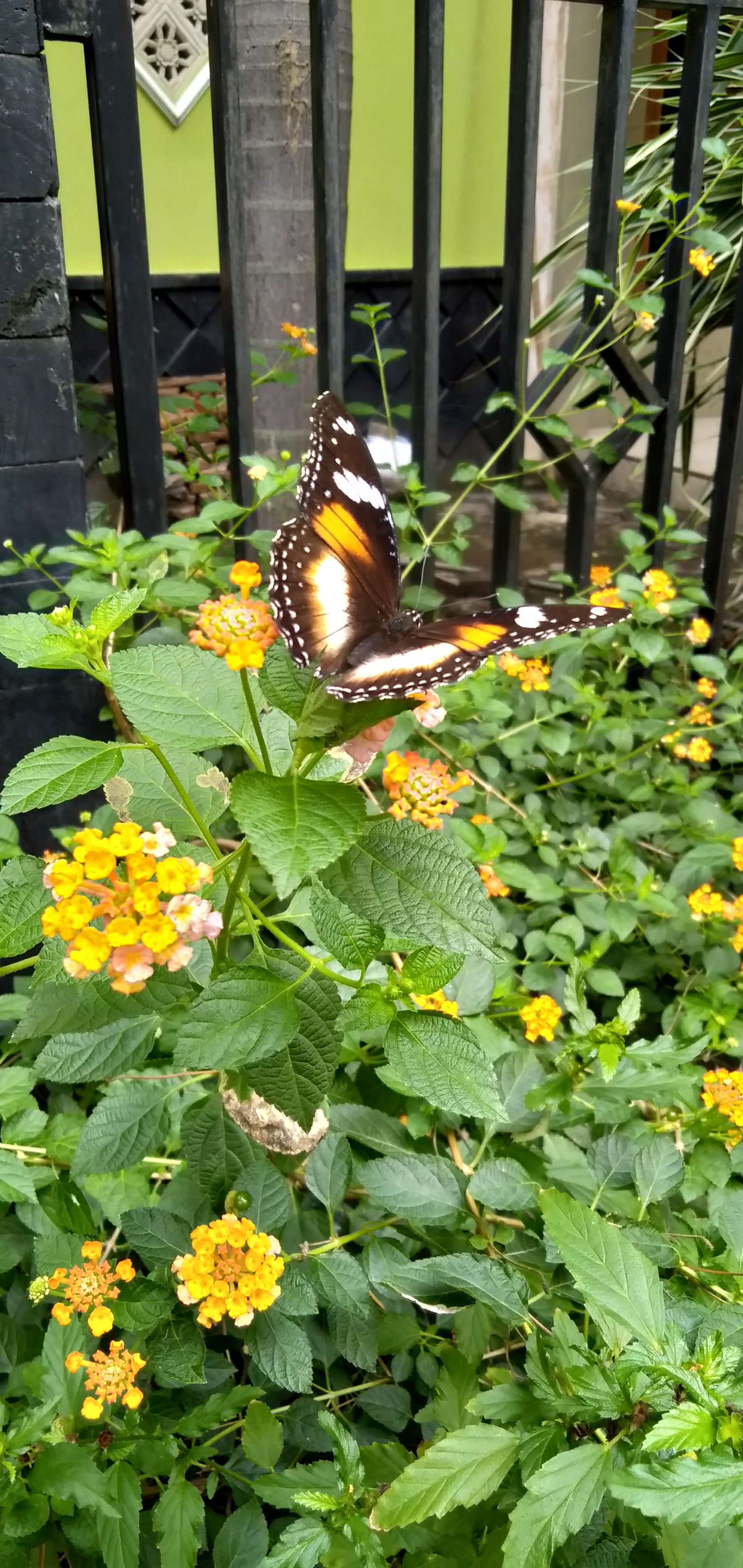 Basa Jawa: kupu-kupu nalika menclok ana ing kembang lan godhong